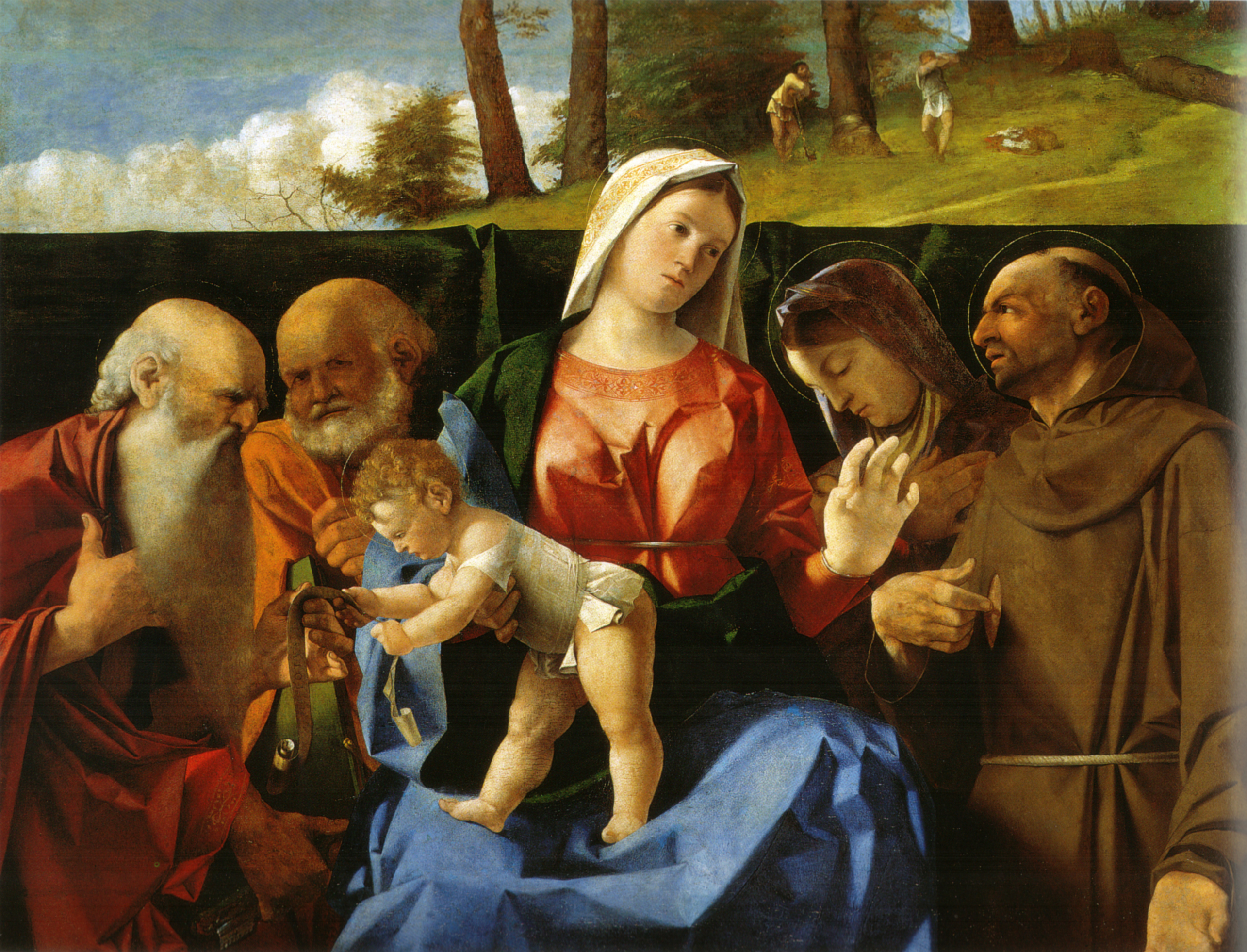 links: Hl. Hieronymus und Hl. Petrus, rechts: Hl. Klara und Hl. Franziskus